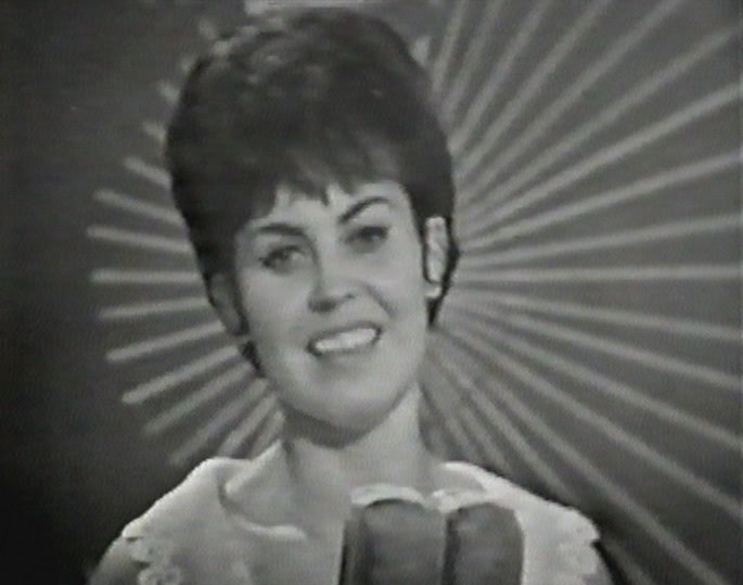 Eurovision Song Contest 1965 Regia di ROMOLO SIENA Allestimento scenografico di FRANCESCO DE MARTINO Luci di GUIDO CARACCIOLO Assistente alla regia ELENA AMICUCCI Assistente di studio MARCELLO SABETTI Capo stuadra tecnica ANGELO FONTANA Prima controllo camere GUSTAVO GALLARATO Capo tecnico audio CIRO PALLONETTO Cameramen ADOLFO BOTTA, SERGIO FREISSENET, ENRICO LANDINI, FLORIDO VARZI ________________________________ Lize Marke